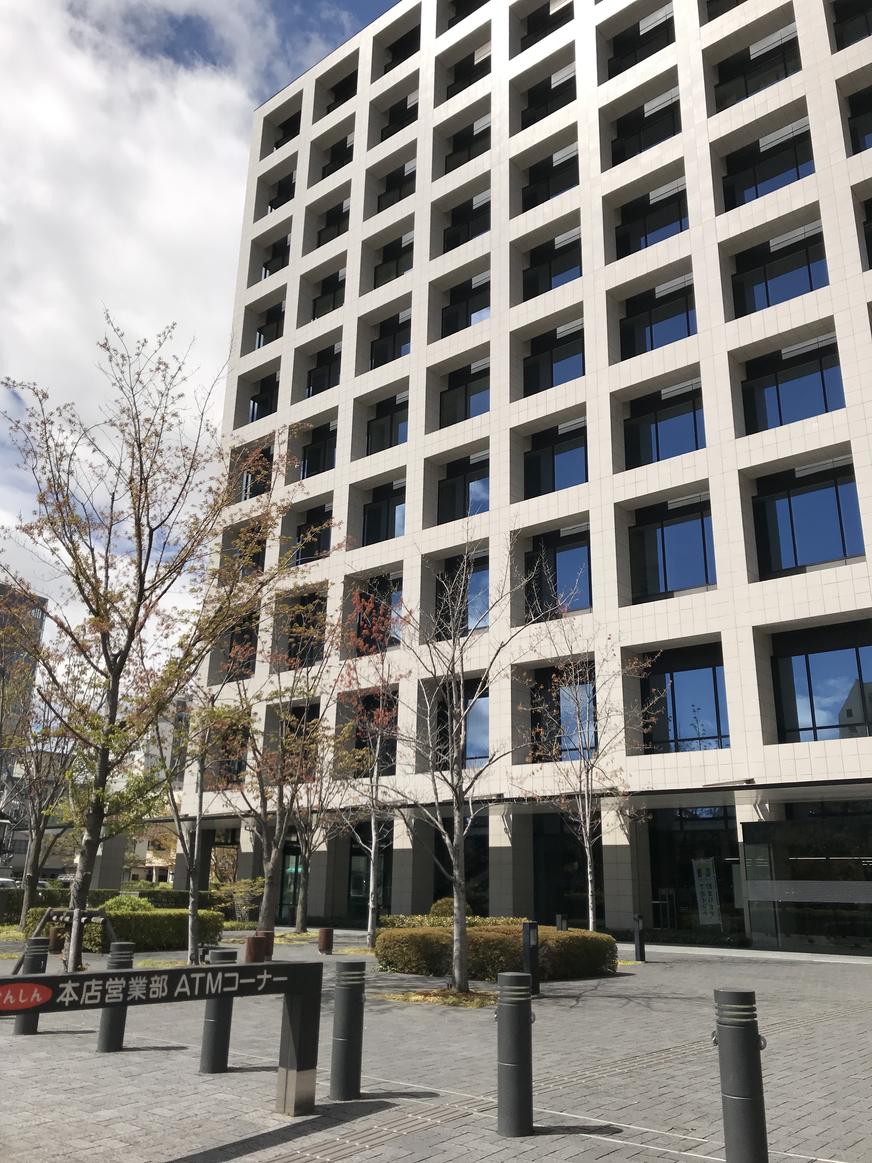 長野県信用組合本社